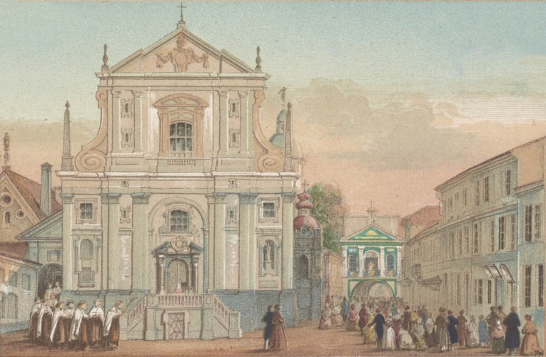 Беларуская (тарашкевіца): Вільня (Vilnia), Вуліца Вастрабрамская (vulica Vastrabramskaja). Касьцёл Сьвятой Тэрэзы і кляштар кармэлітаў